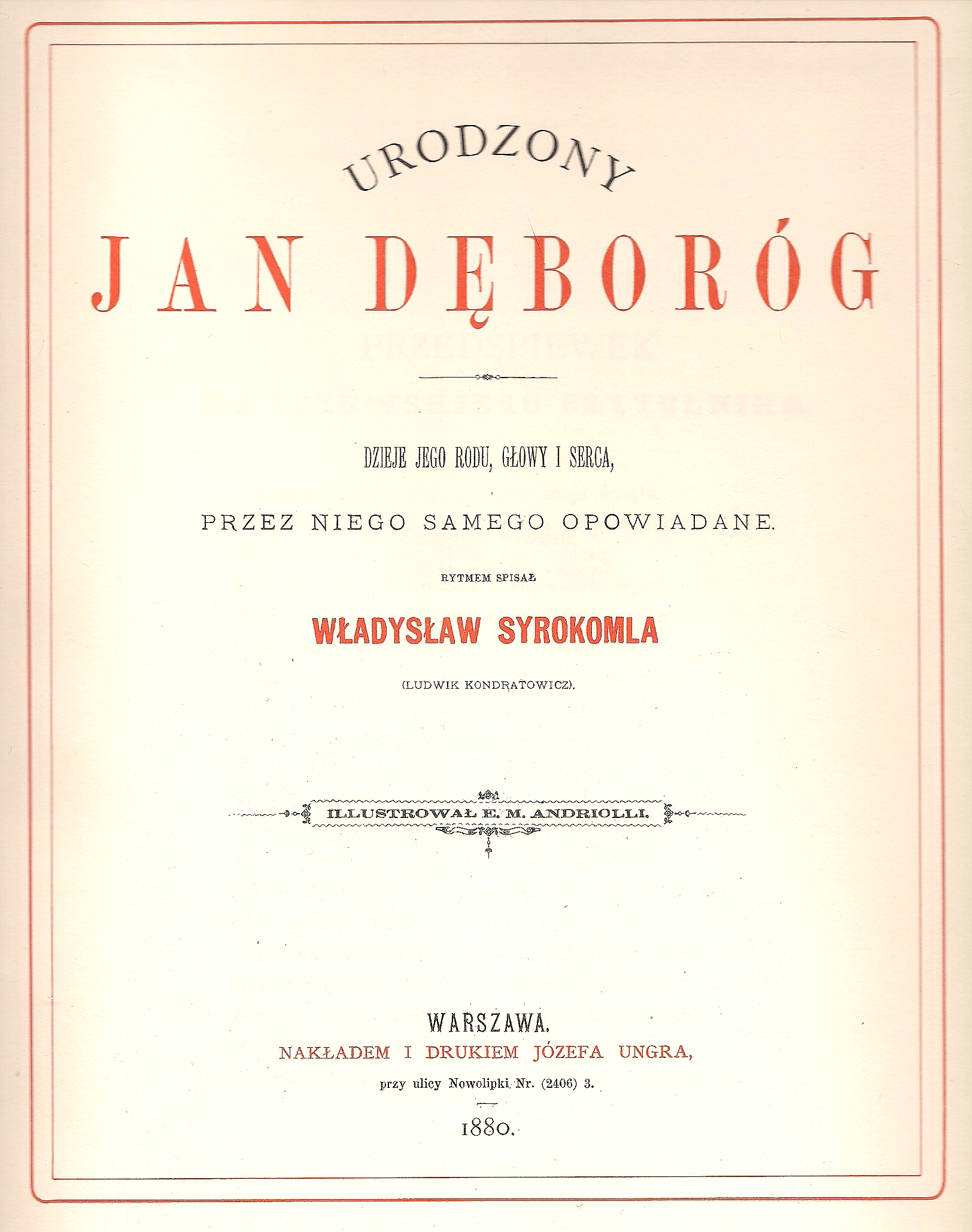 Urodzony Jan Dęboróg - strona tytułowa